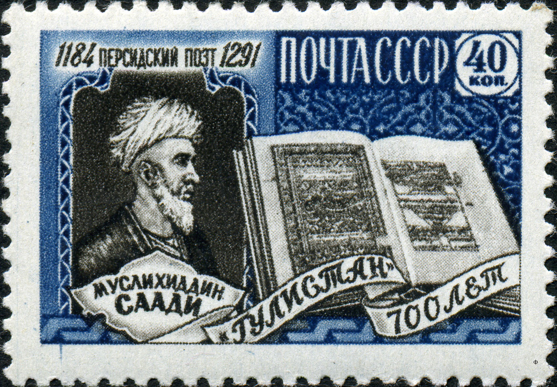 Марка СССР